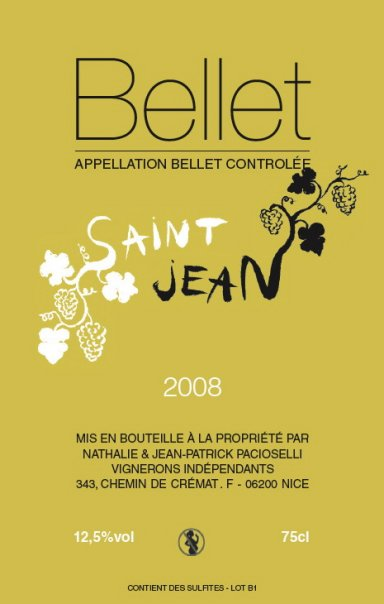 Etiquette Domaine Saint Jean - Vin de Bellet